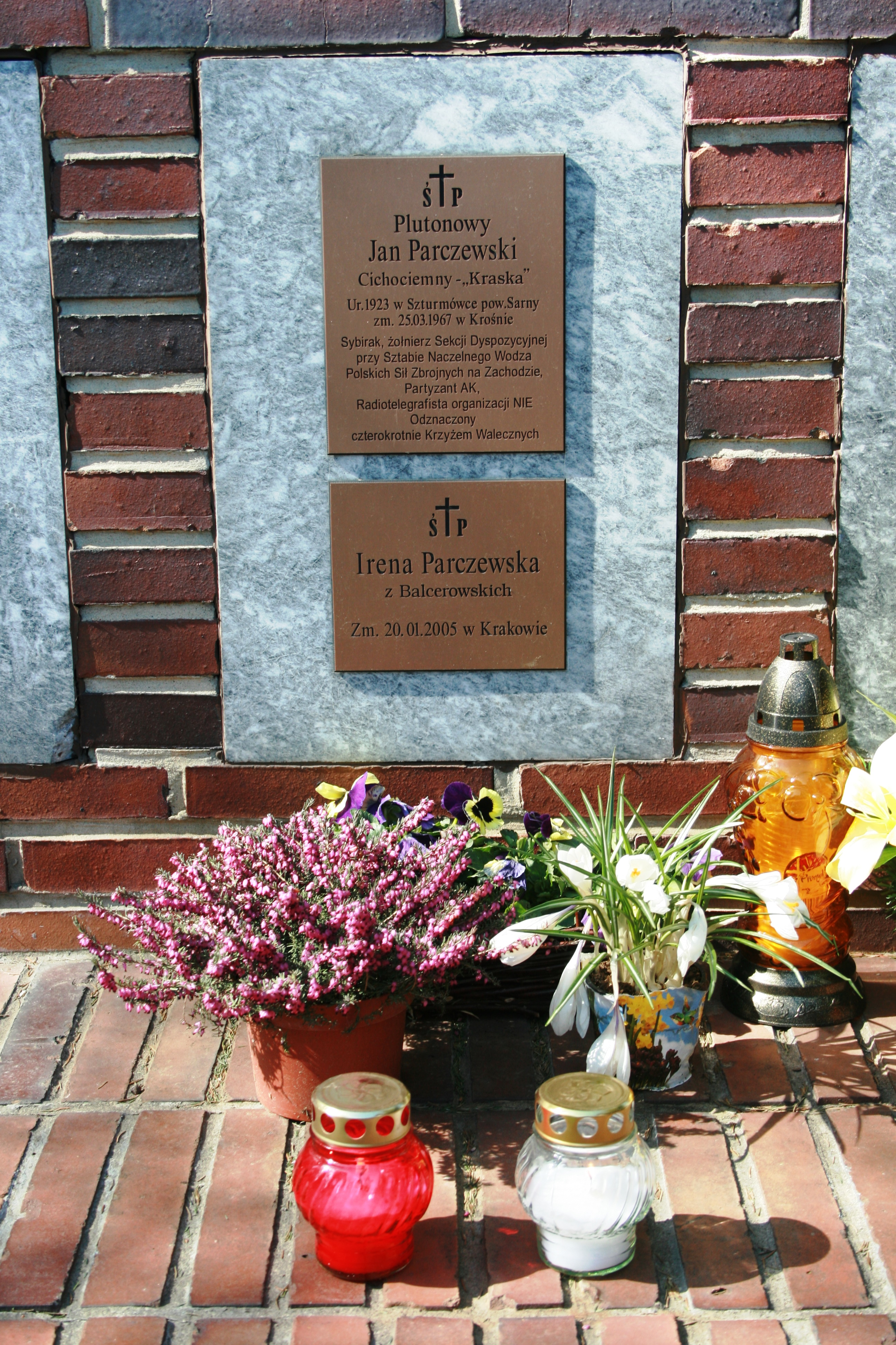 Kwatera Pierwszej Samodzielnej Brygady Spadochronowej na Powązkach Wojskowych w Warszawie